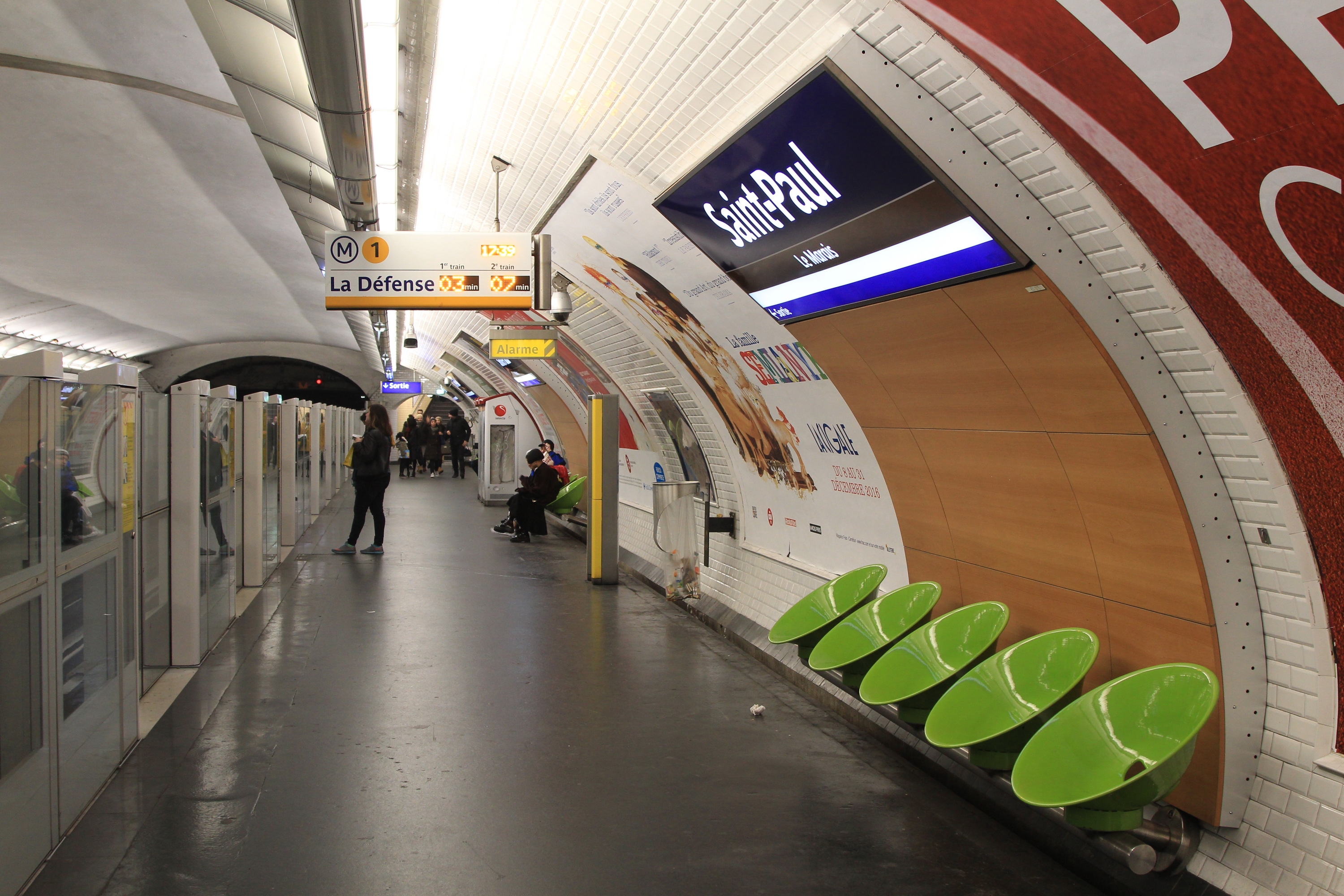 Quai La Défense de la station Saint-Paul du métro de Paris.